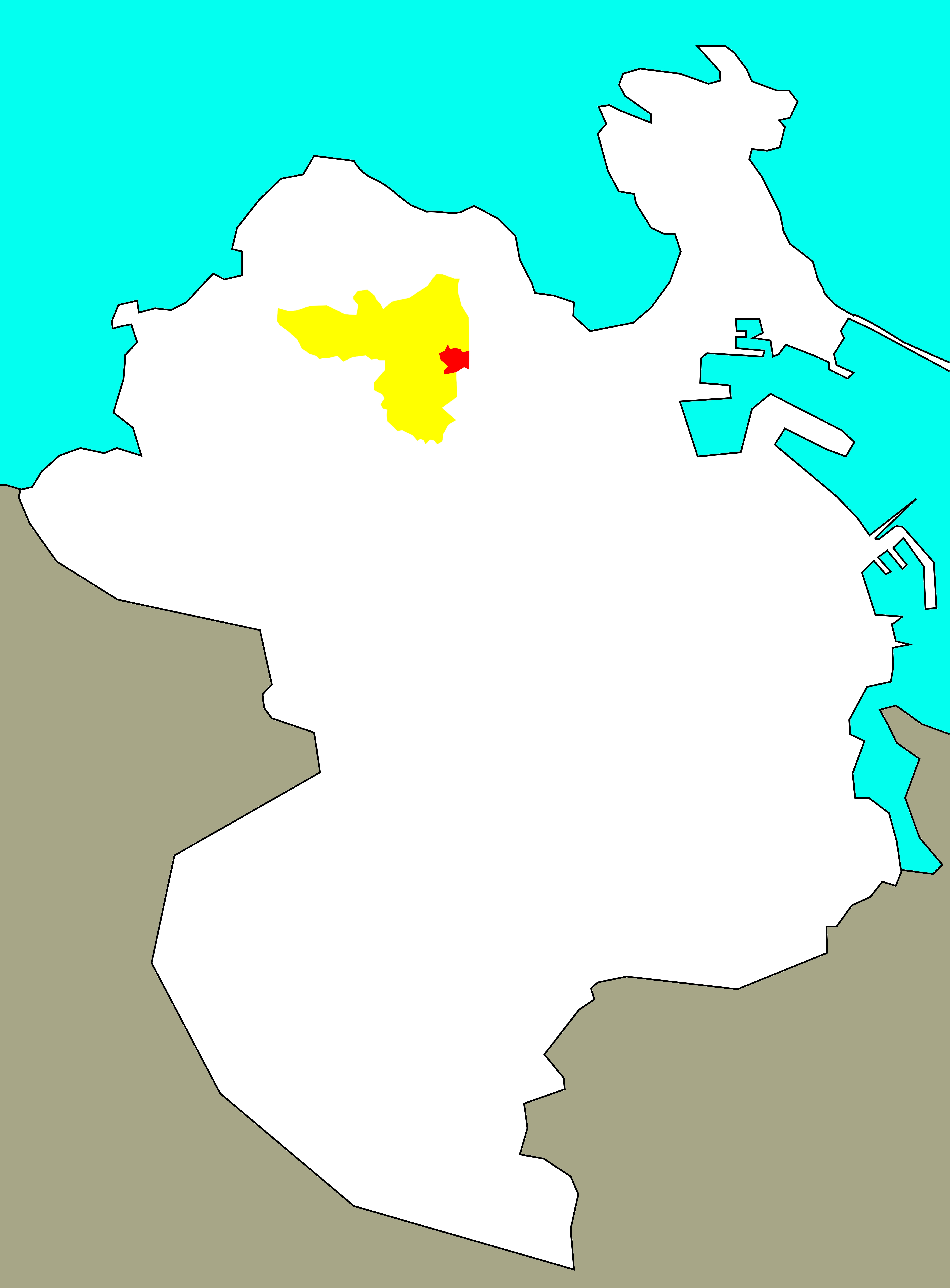 Situación do Río no "barrio-territorio" de San Pedro de Visma.[1]